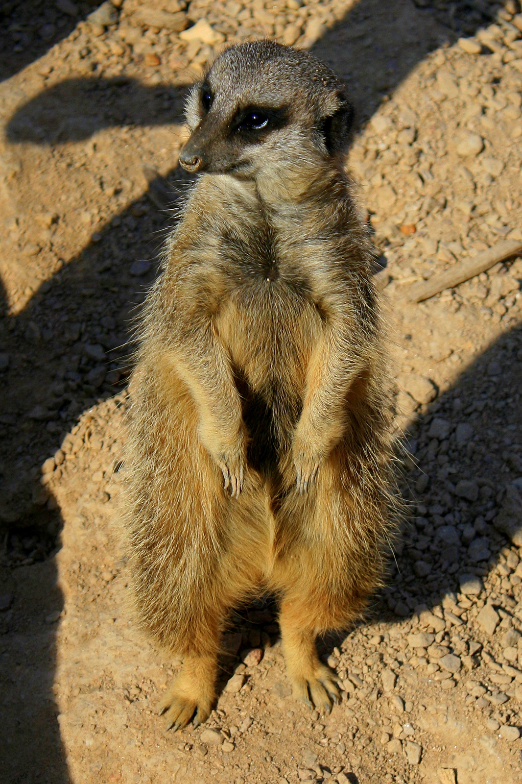 Meerkat at London Zoo